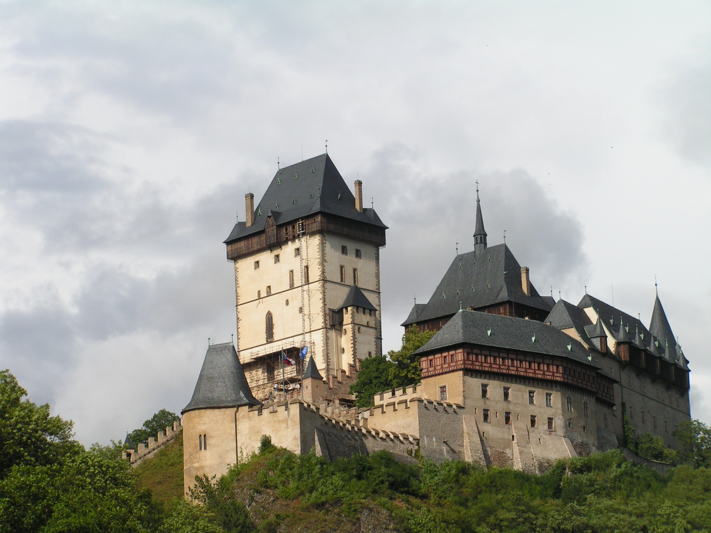 Karlštejn